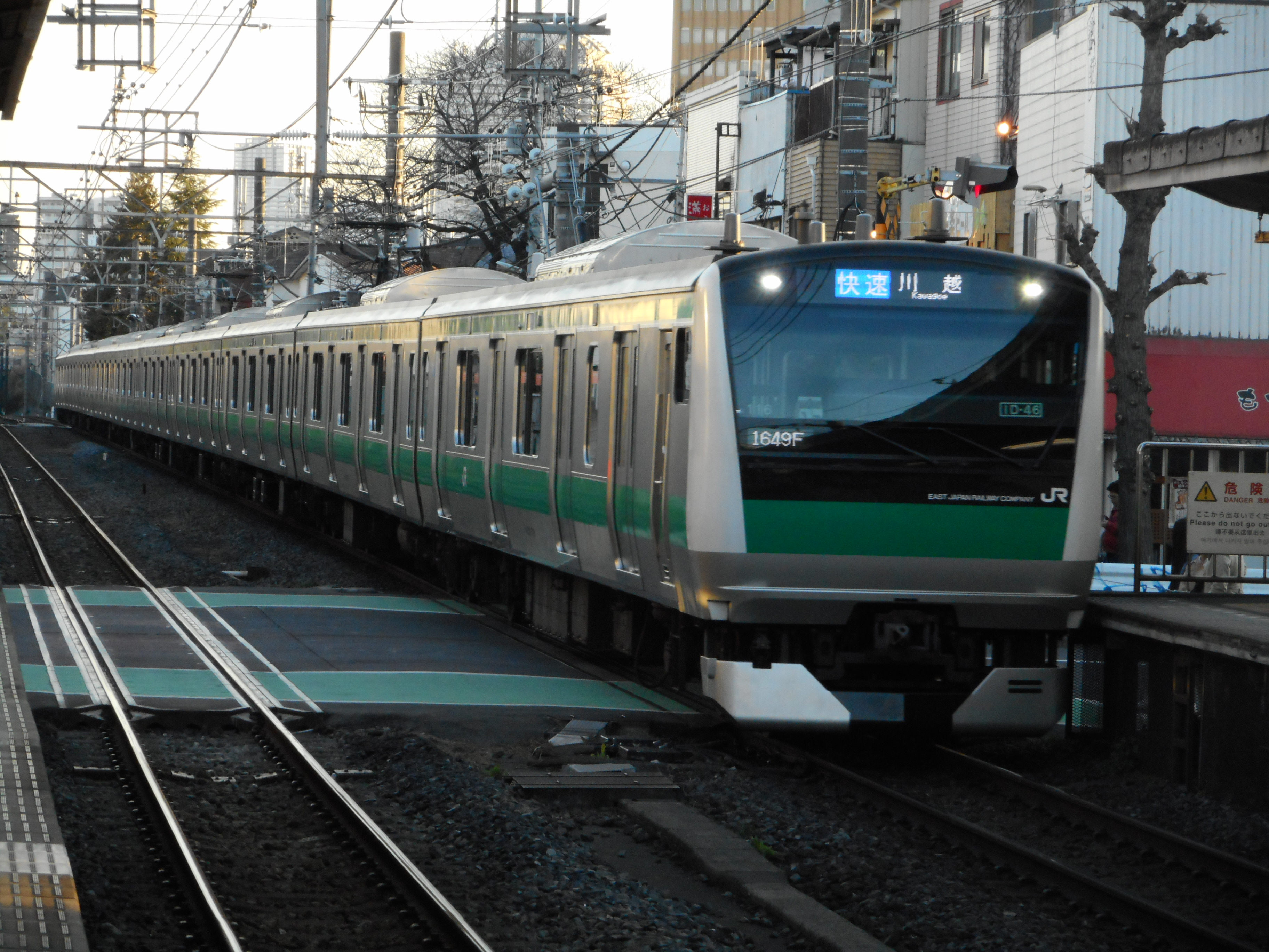 十条駅に到着するの埼京線用E233系7000番台ハエ116編成（十条駅上りホームから撮影）